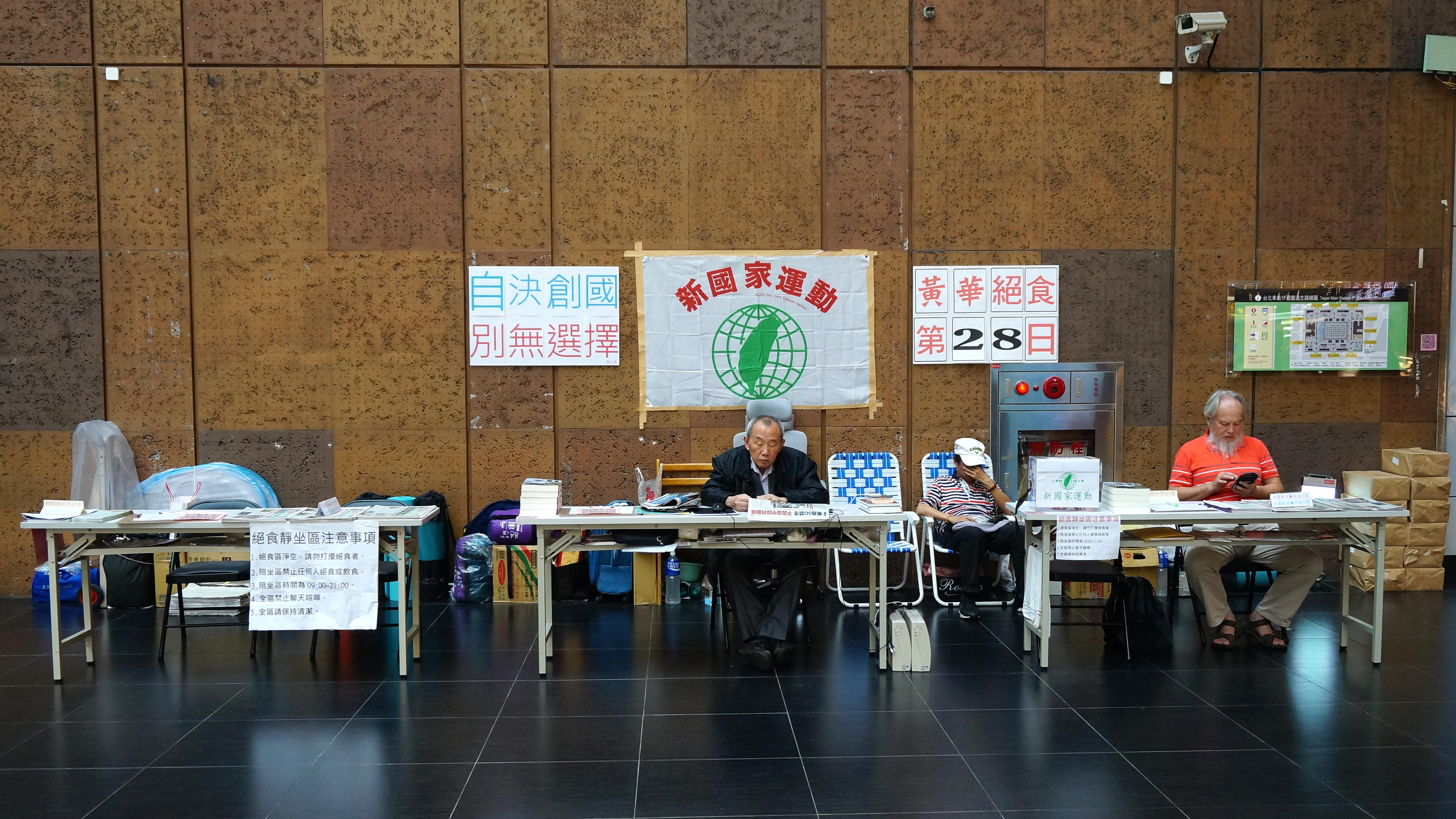 中文（台灣）: 臺灣獨立運動人士黃華（中）於臺灣鐵路管理局臺北車站一樓大廳絕食抗議第28日，後方貼「新國家運動」旗幟。右一為前公投護台灣聯盟執行長賴芳徵。